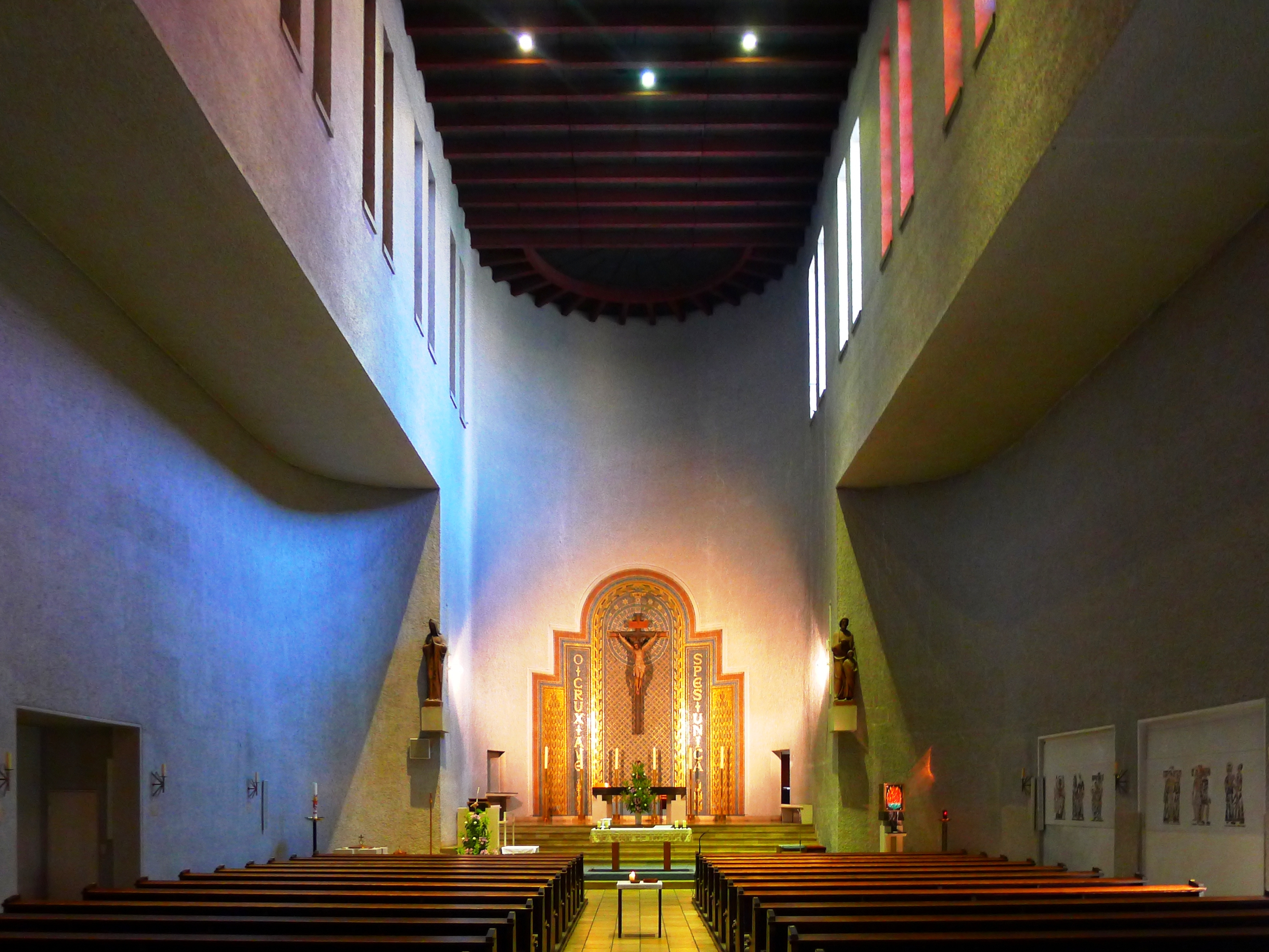 Blick Richtung Apsis